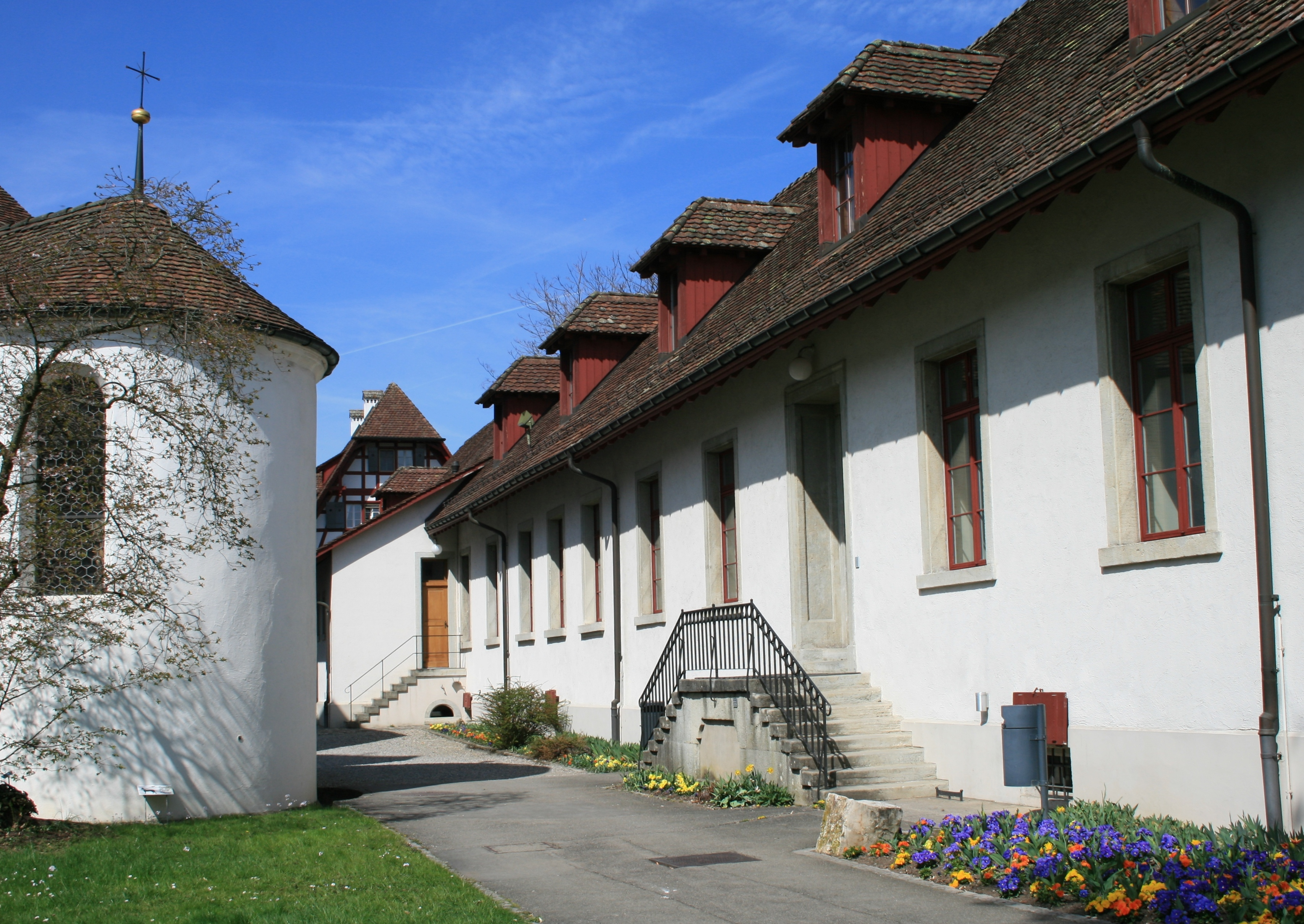 Kloster